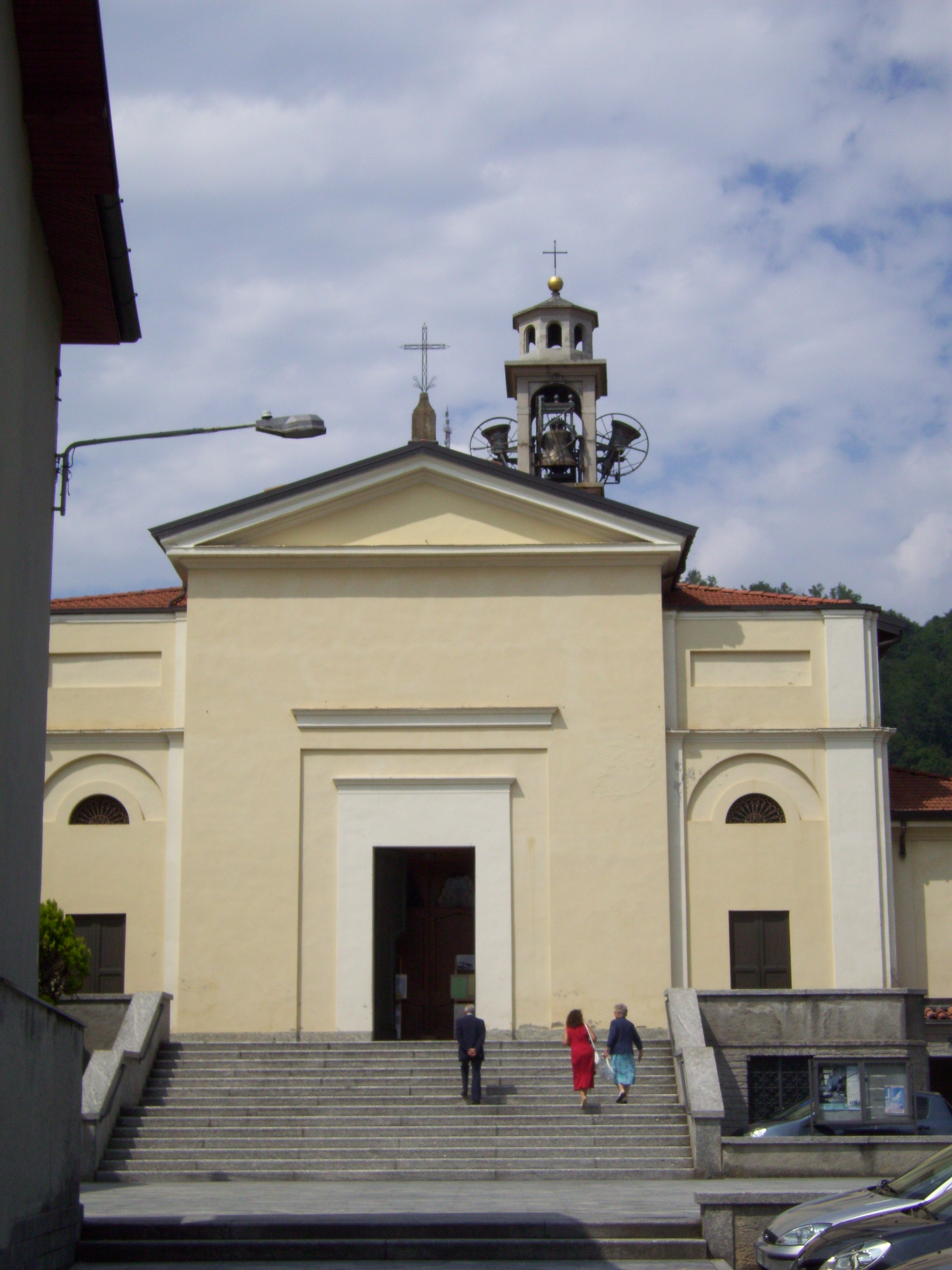 facciata della chiesa parrocchiale di Albate, dedicata a Sant'Antonino Martire